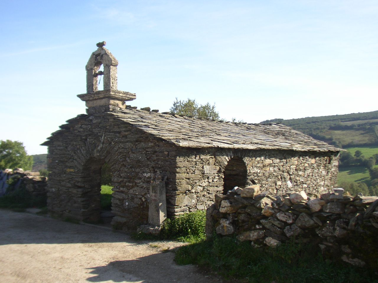 A la entrada de Biduedo se encuentra la Ermita de San Pedro.